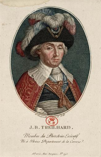 Portrait de Jean-Baptiste Treilhard (1742-1810), juriste et homme politique français. Estampe : eau-forte, burin.